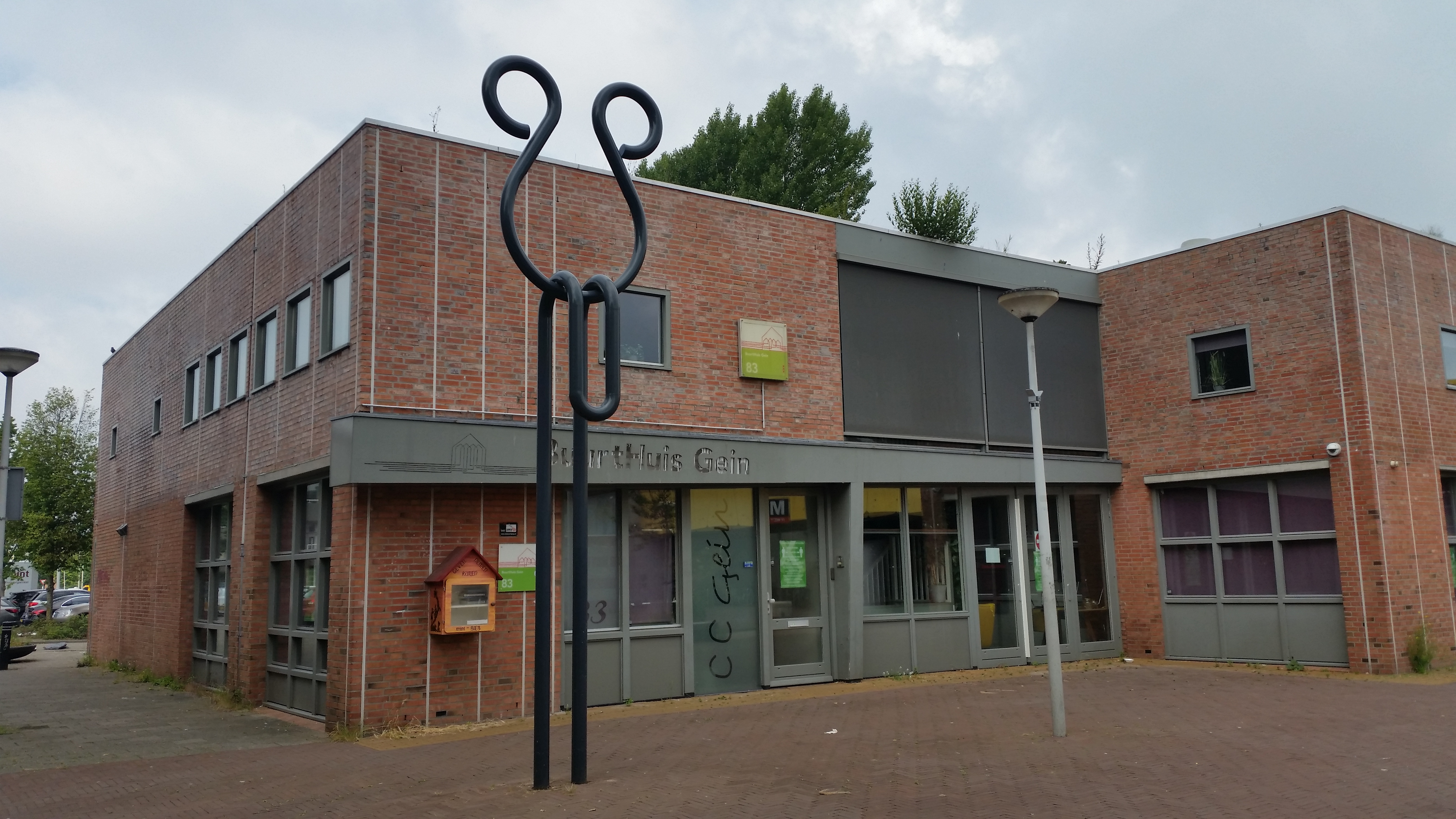 Haak en oog, een vrijwel onbekend beeld van Wendela Gevers Deynoot in Amsterdam Zuidoost.